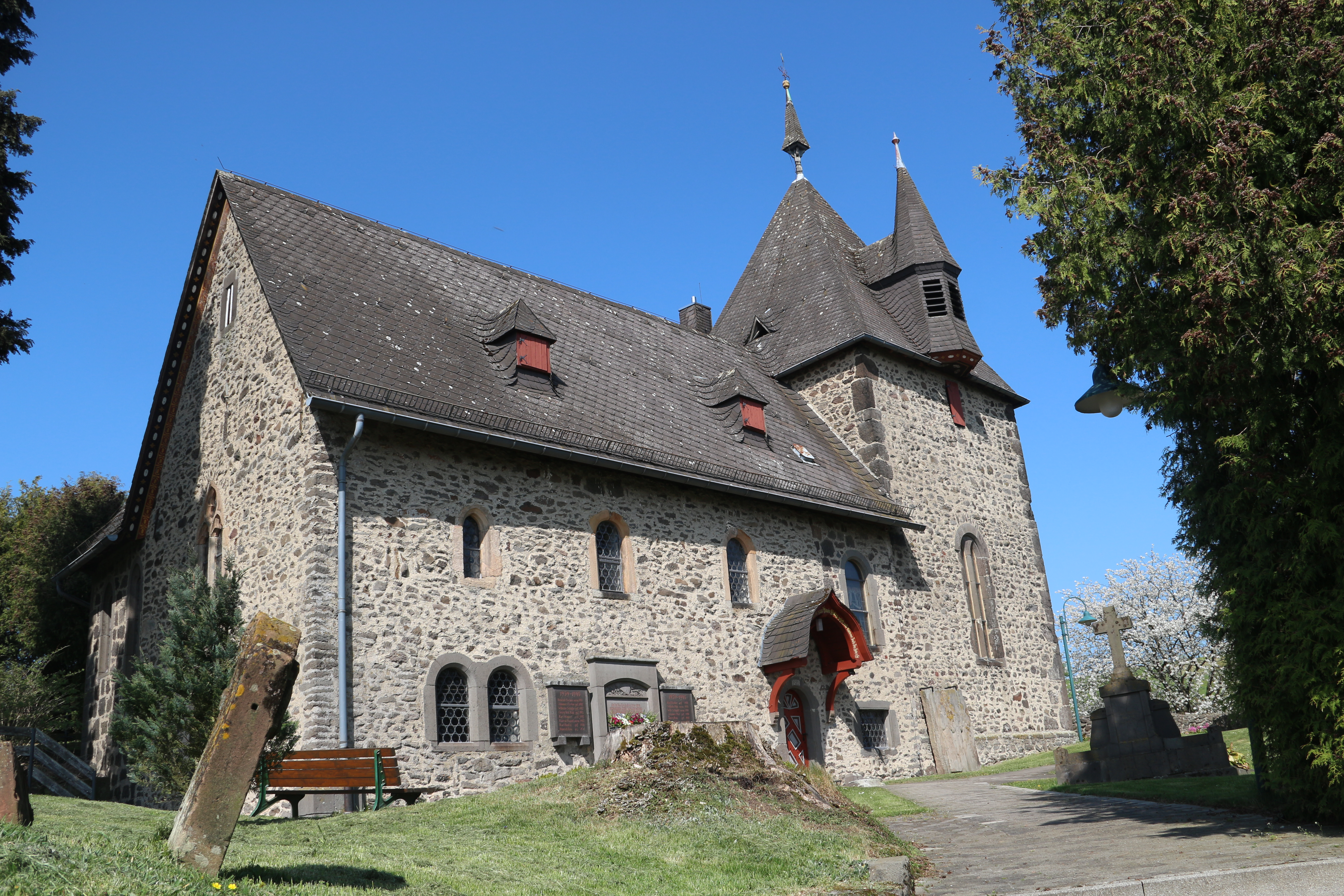 Kirche in Winnen